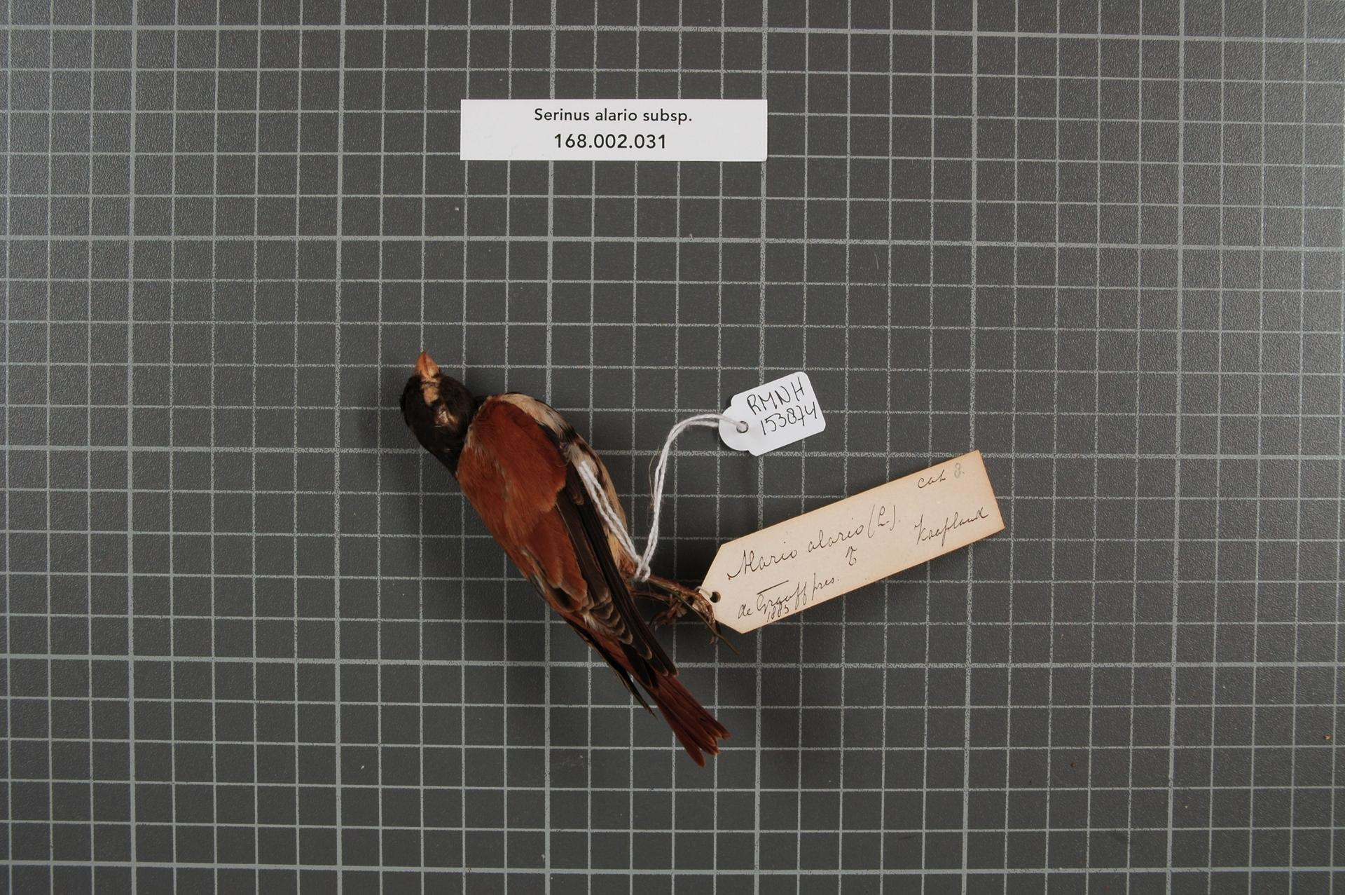 Serinus alario subsp.